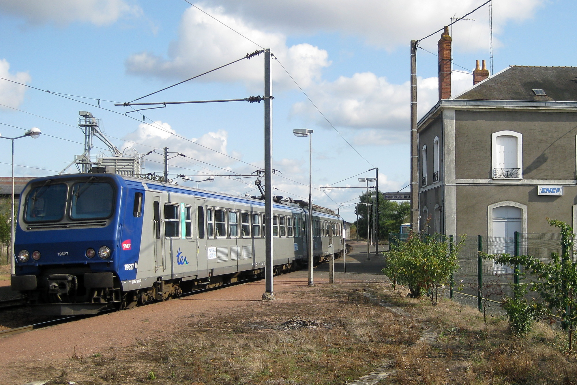 La Z 9627 à destination de Saumur et Tours dessert la gare de Montreuil-Bellay